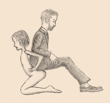 Meuble humain, human furniture, forniphilie, forniphilia.